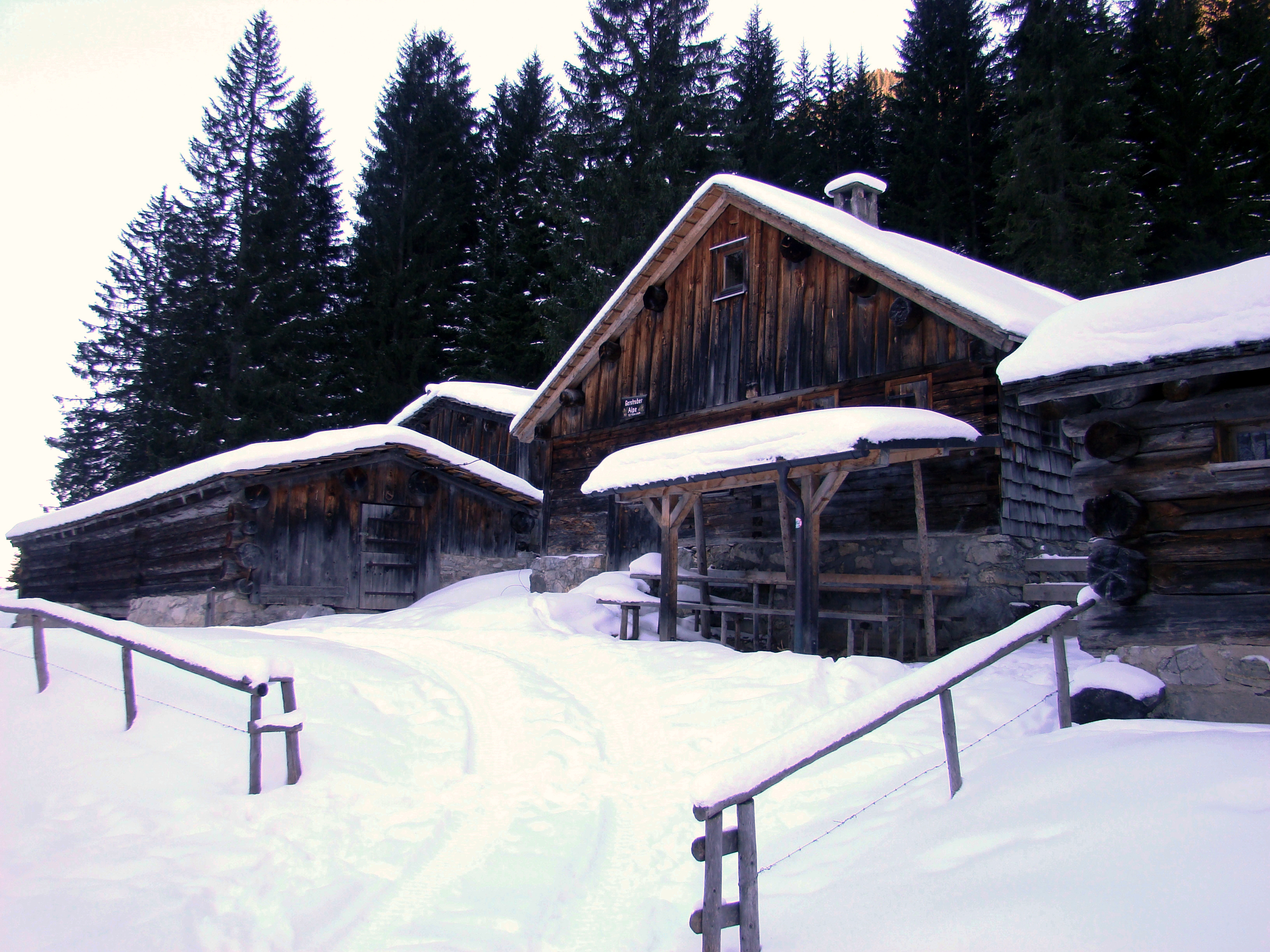 Gerstruber Alpe (1216 ü. NN)